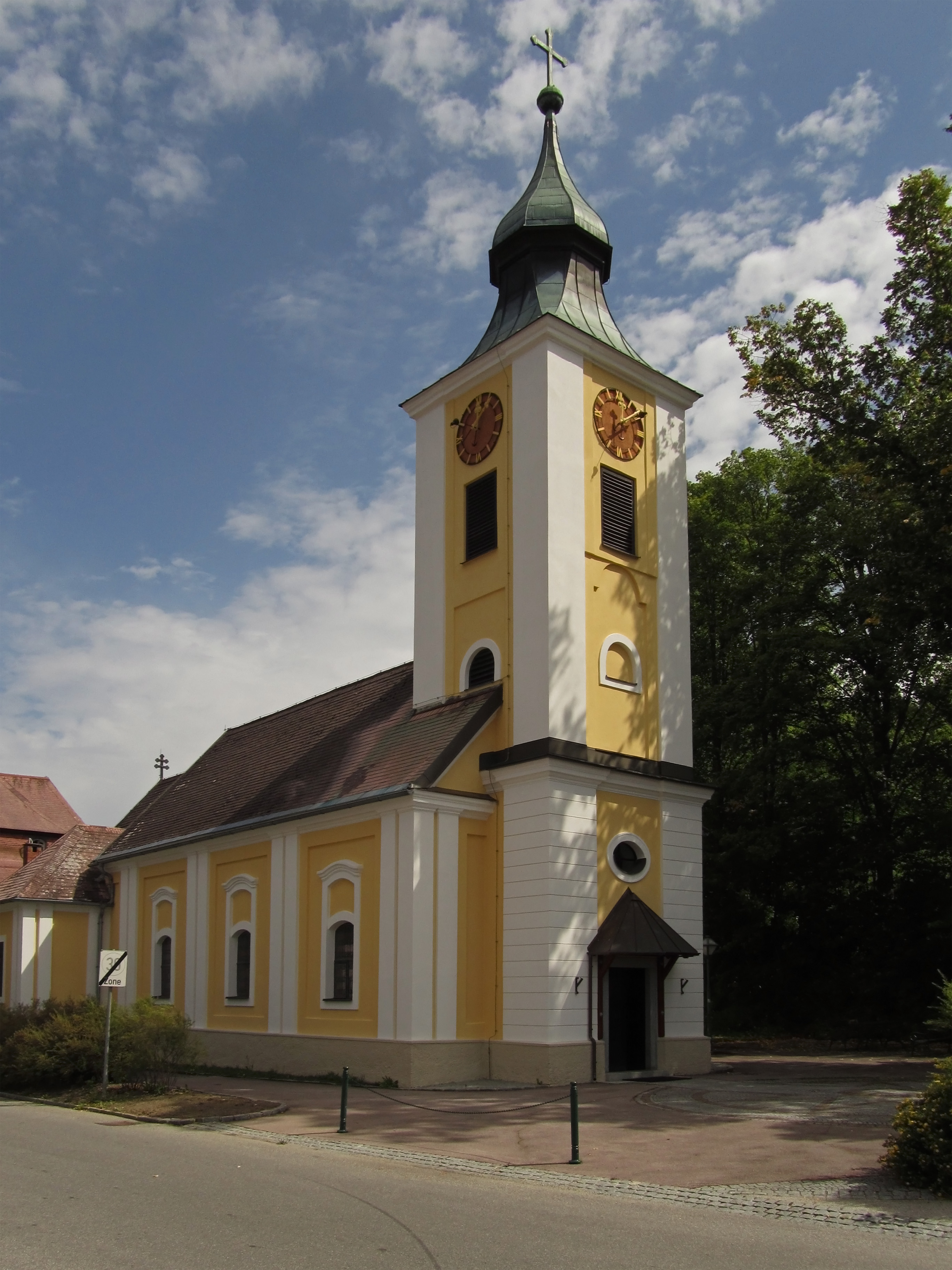 Kath. Pfarrkirche Heimsuchung Unsere Liebe Frau - Spätbarocke Saalkirche, 1726 nach einer angeblichen Marienerscheinung an Stelle einer Holzkapelle über einer Heilquelle errichtet. Kapellenneubau 1770, Neubau als Schlosskirche um 1800.